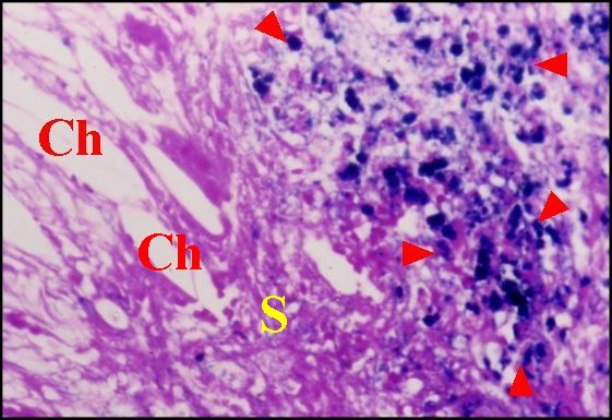 Granulome à cholestérol avec dépôts d'hémosidérine dans la paroi d'un cholestéatome